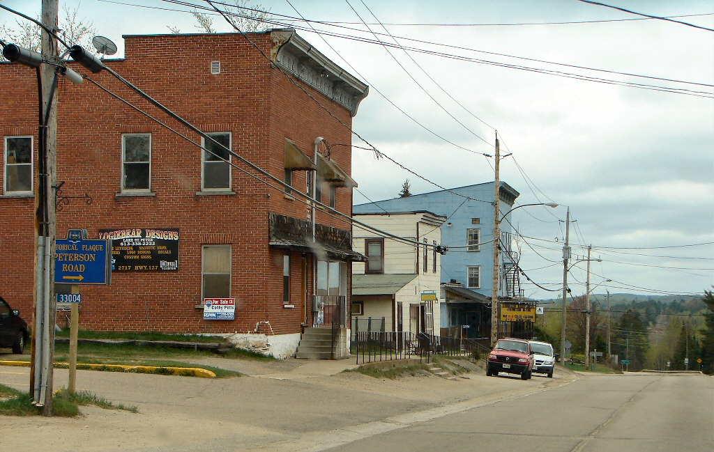 Maynooth, Ontario, Canada